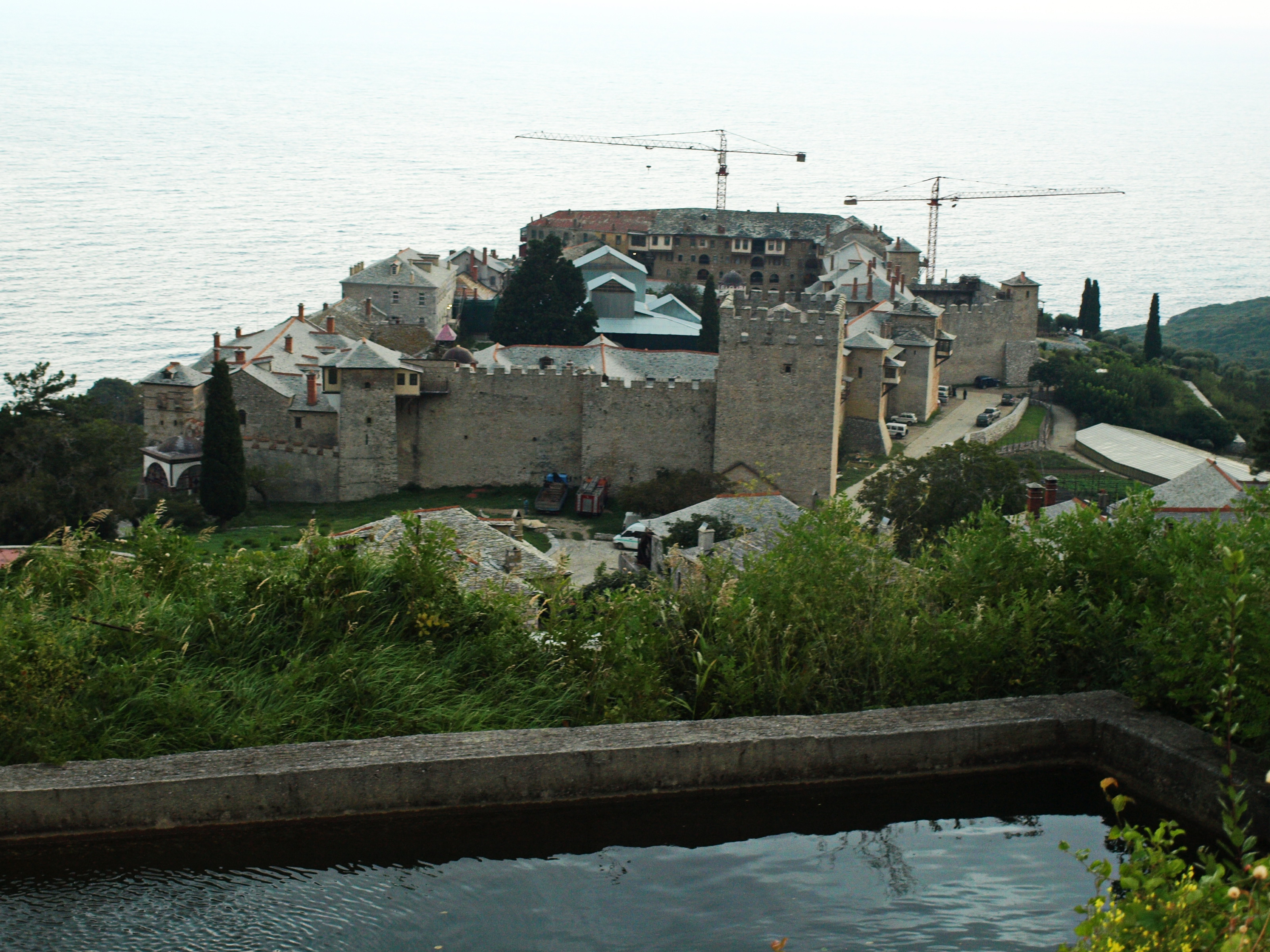 Манастир Велика Лавра